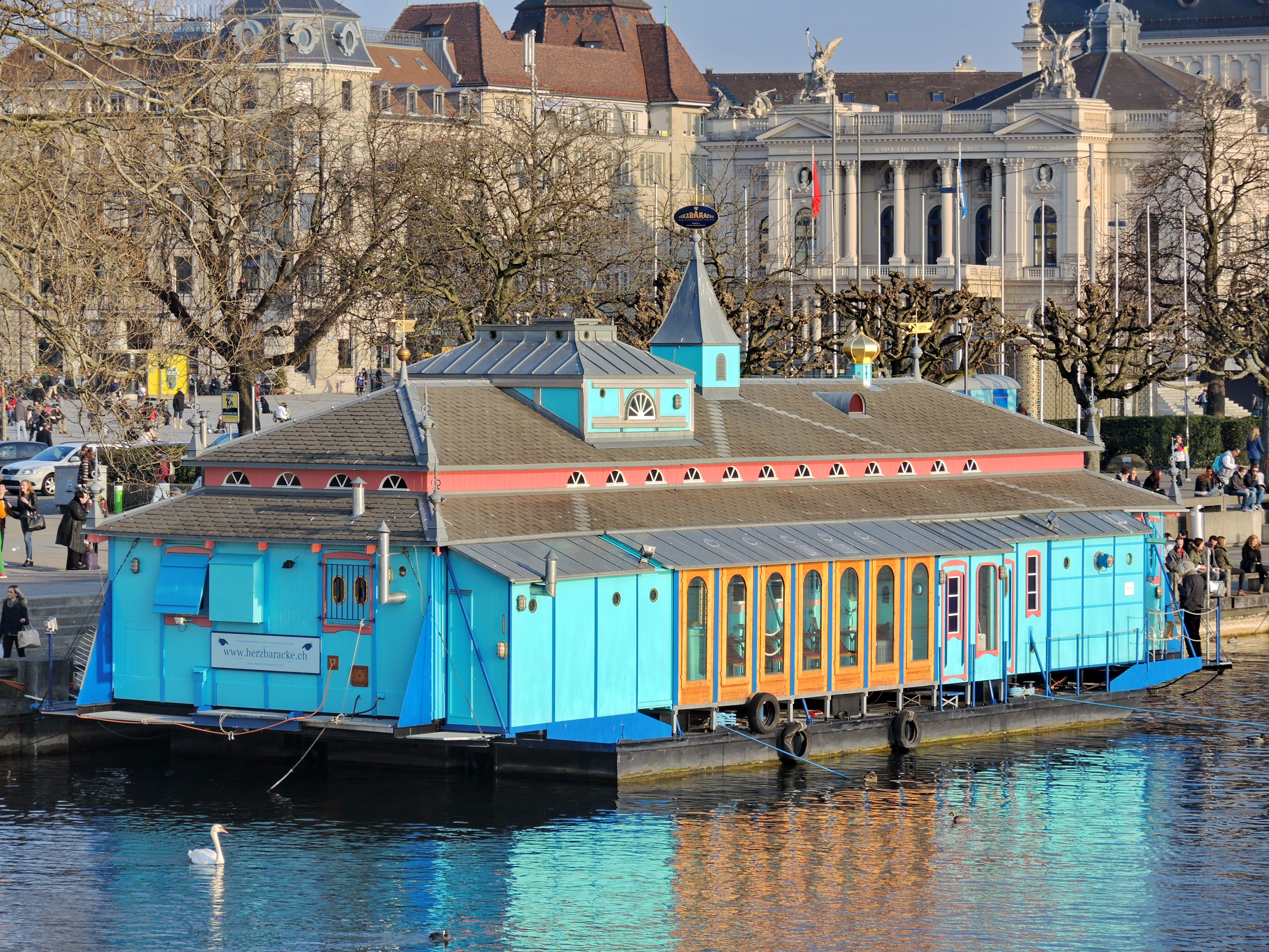 Herzbaracke on at Utoquai in Zürich (Switzerland), as seen from Quaibrücke, Sechseläutenplatz and Opernhaus in the background